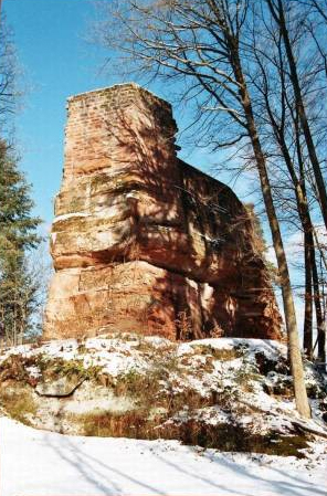 Ruine Blumenstein